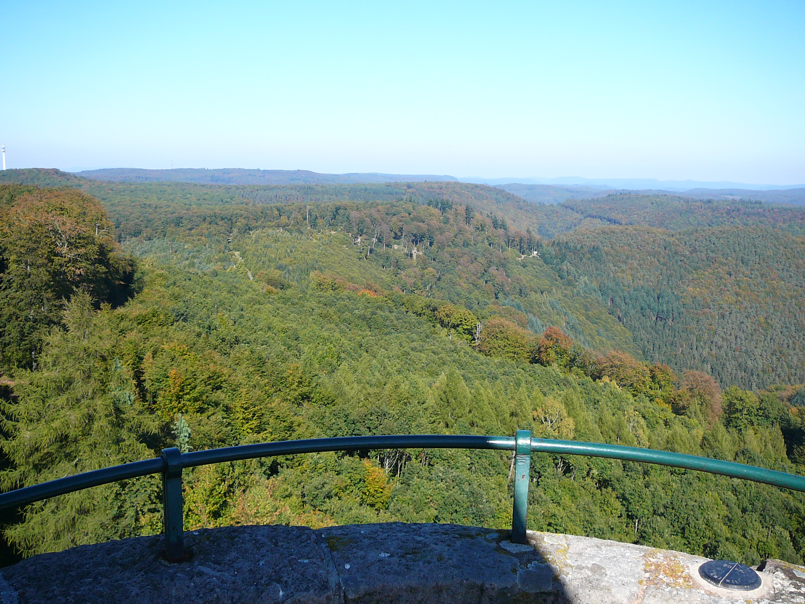 Der Weißenberg als Berg mit relativ hoher Dominanz und geringer Schartenhöhe: Blick vom Luitpoldturm nach Norden